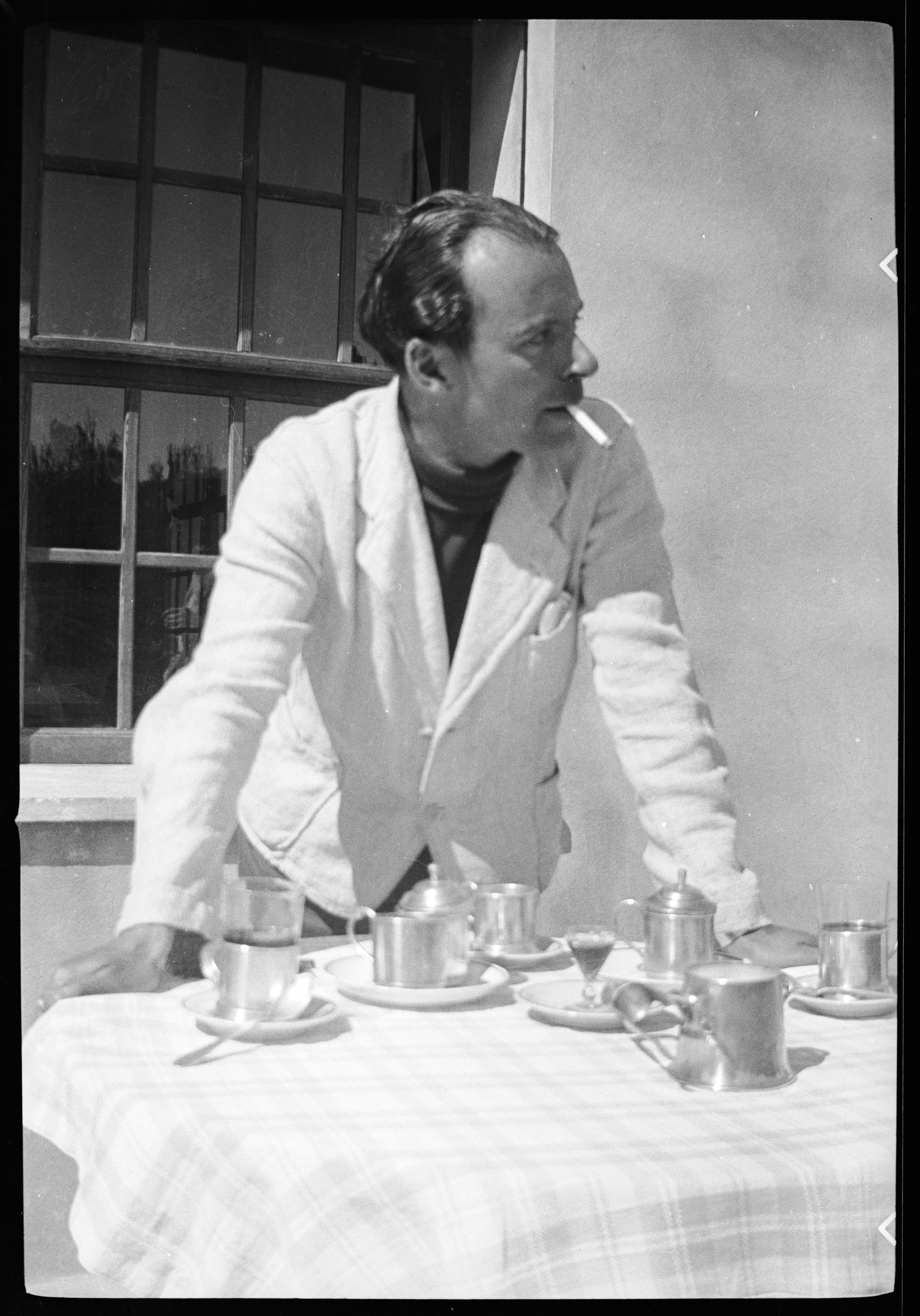 Frankreich, Lavandou: Menschen [Lokalisierung unsicher]; Klaus Mann